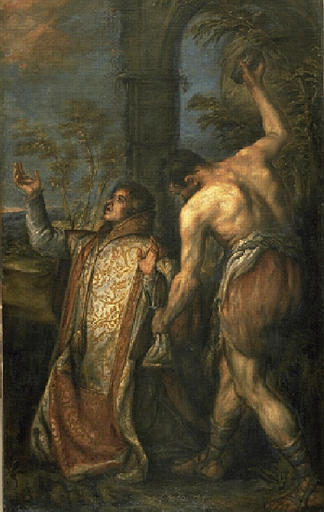 Diego Polo, Martirio de San Esteban, óleo sobre lienzo, 194 x 121 cm. Lille, Musée des Beaux Arts